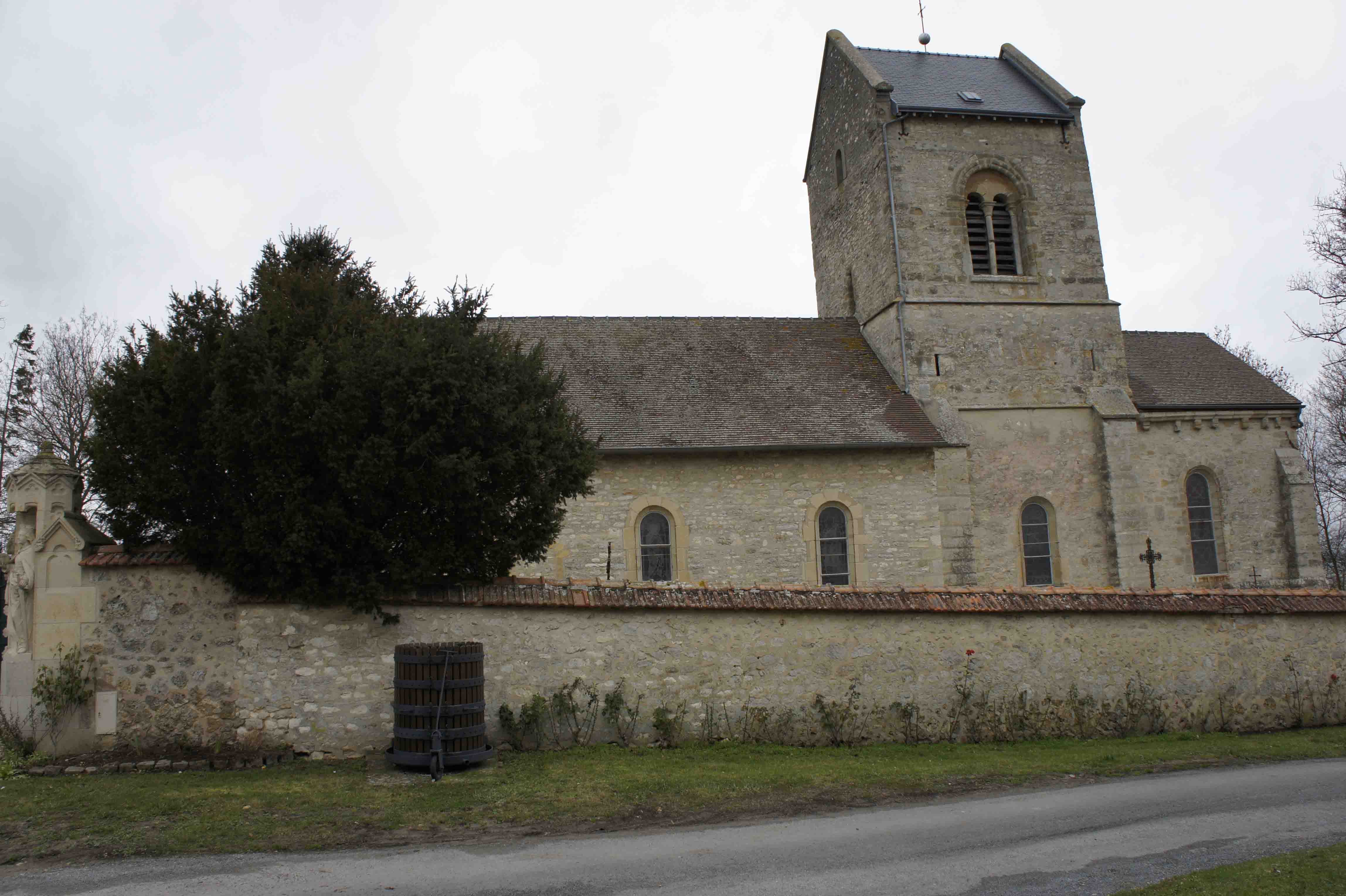 l'église de Pargny - vue du sud